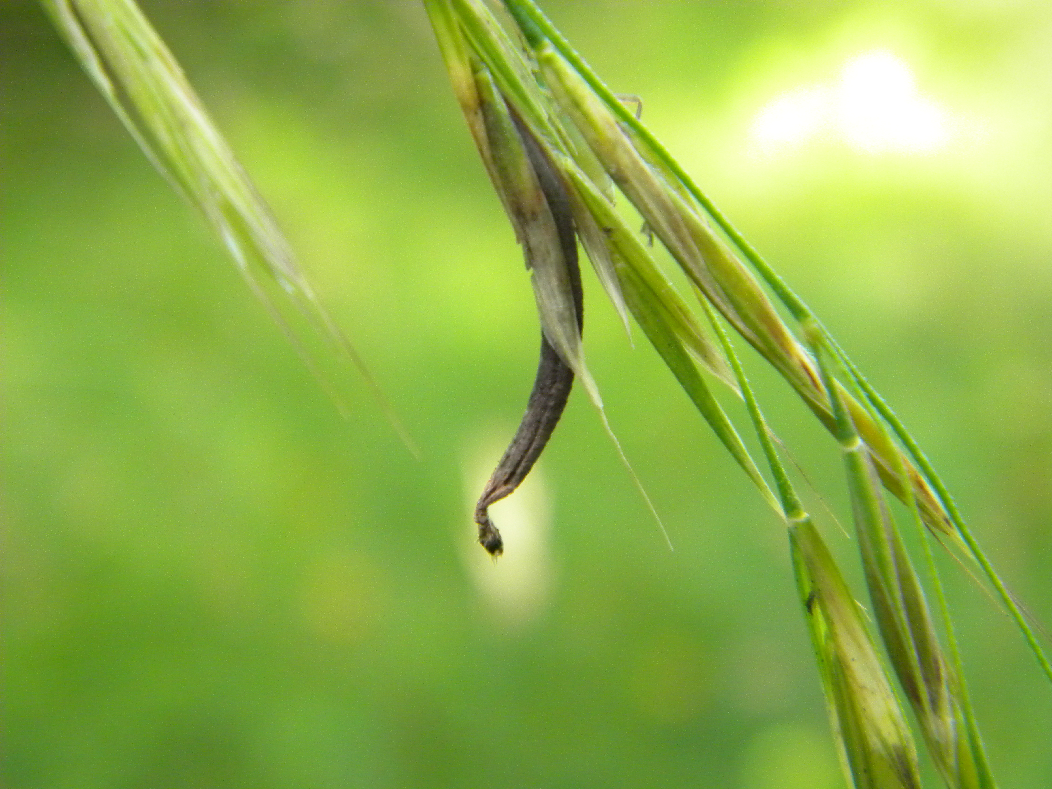 Bromus erectus Nantoux